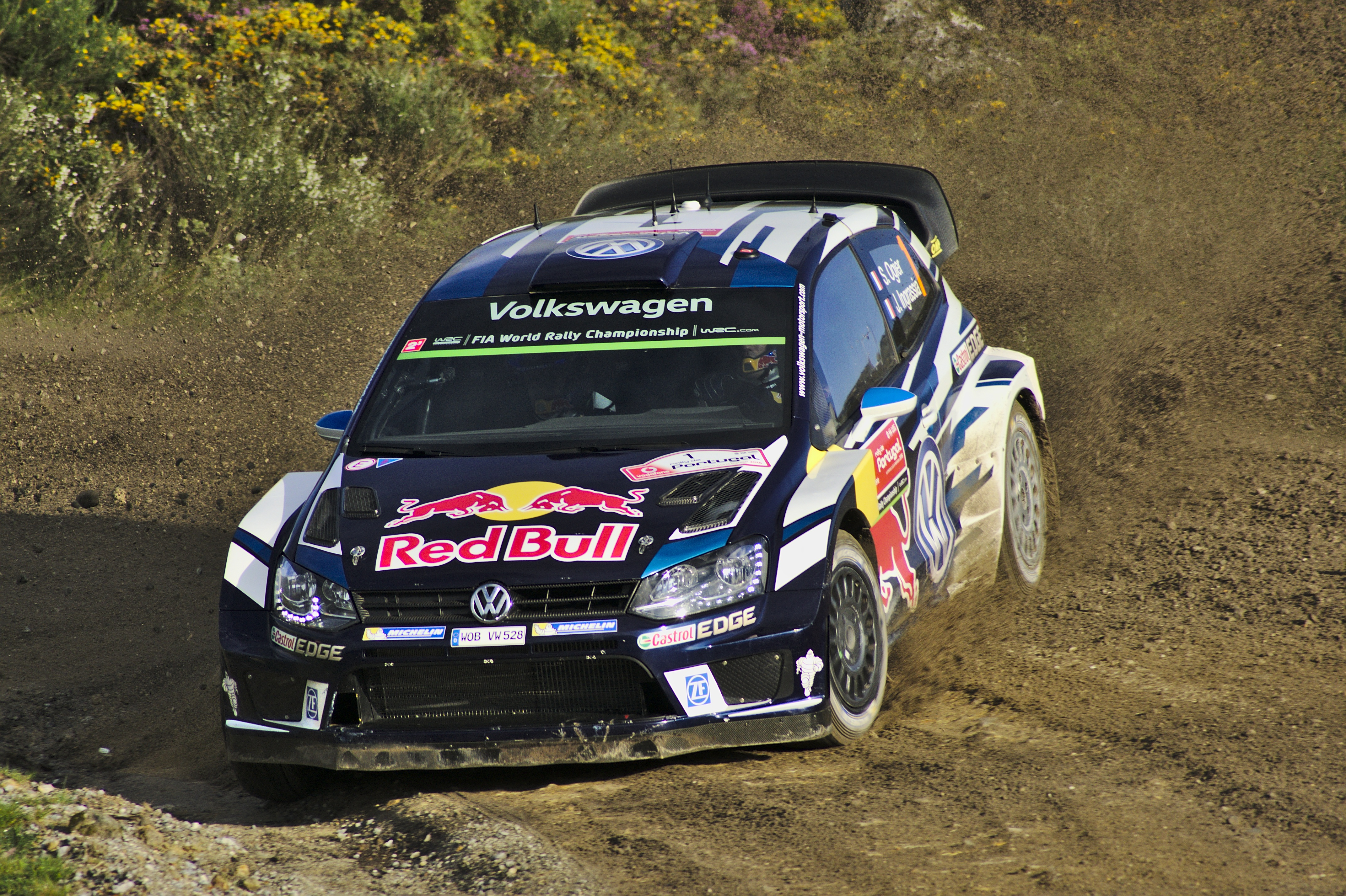 Rajd Portugalii 2016 Sébastien Ogier